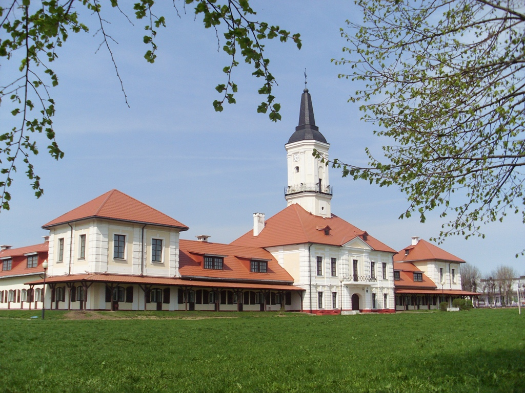 Шклоў. Ратуша